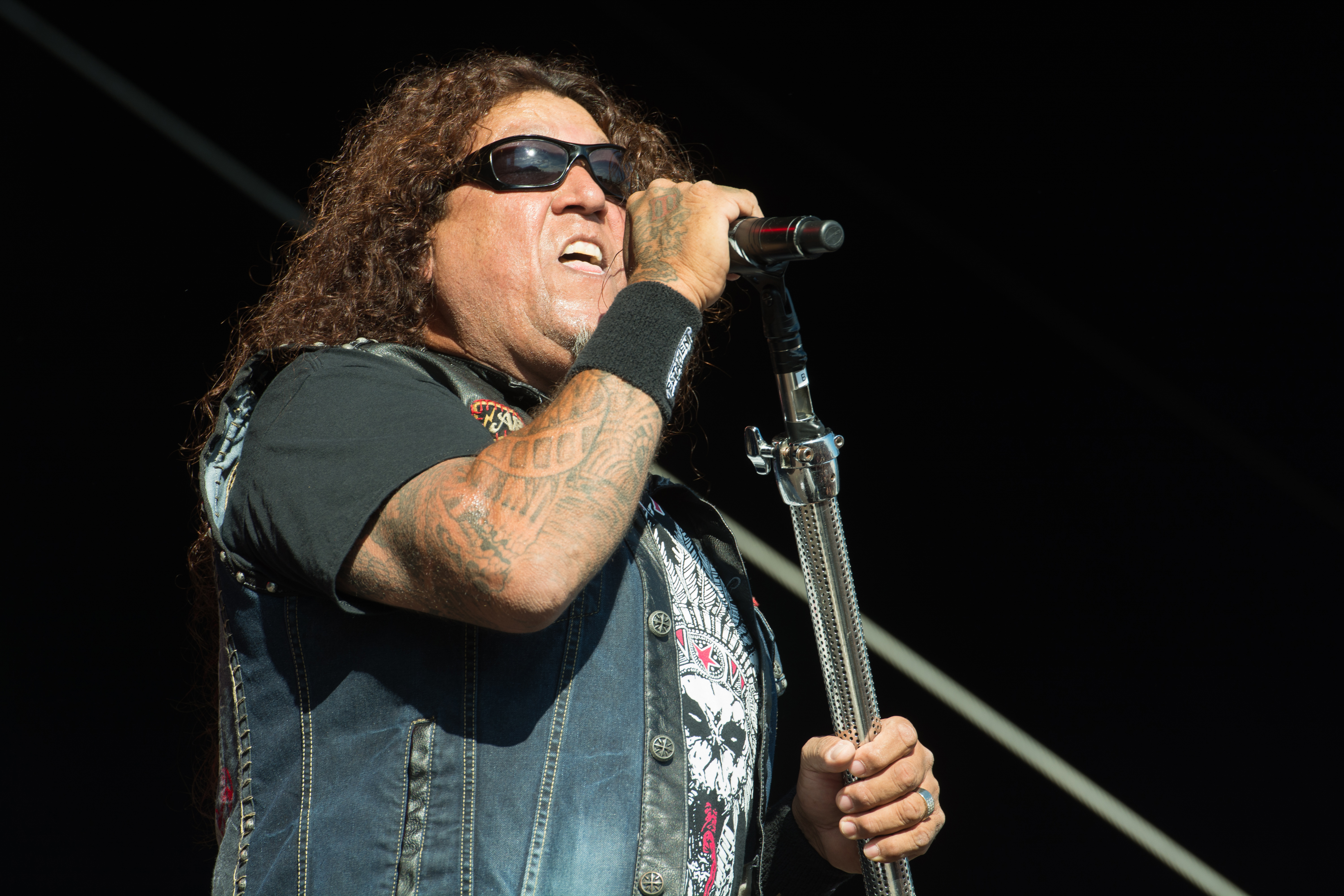 Testamemt beim Elbriot 2016